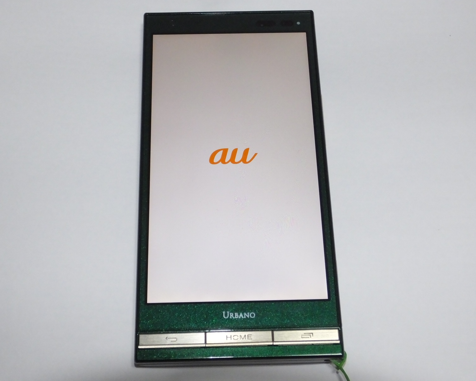 au KYV31 URBANO V01